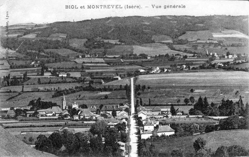 Biol et Montrevel (Isère), vue générale